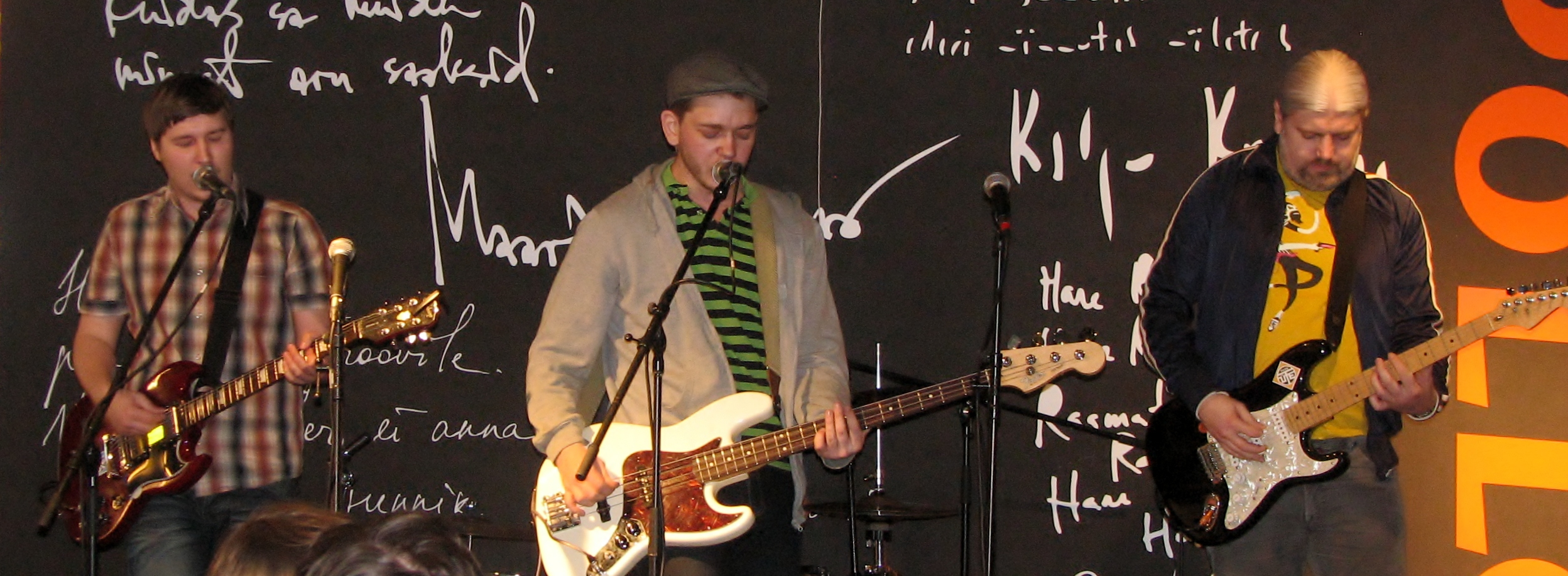 Ans. Andur esinemas Tallinn Music Weekil